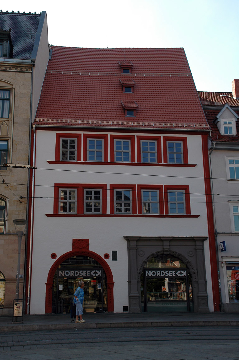 Haus zum schwarzen Löwen (errichtet 1577) am Anger in Erfurt